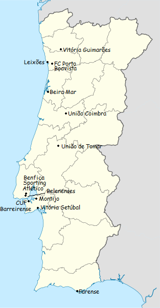 Carta dos clubes participantes do campeonato de portugal de futebol de primeira divisao 1972-1973